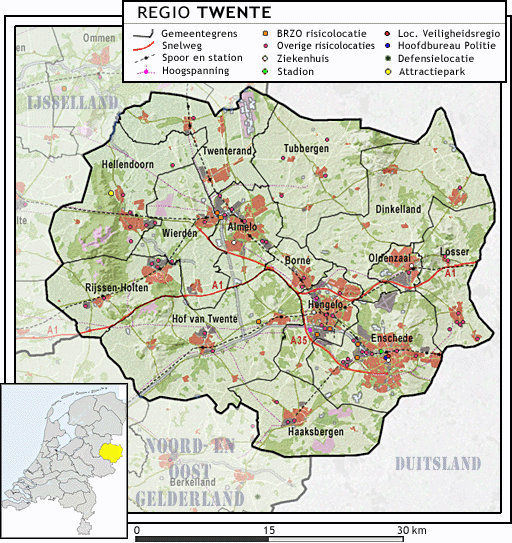 Veiligheidsregio Twente, met indeling van gemeenten (2009) en impressie van het landschap. Door Jan-Willem van Aalst, samengesteld uit publiek beschikbare geo-data: Referentie-ondergrond (kustlijn, steden, wegen) gerasterd uit de OpenStreet Map OSM. ( Inhoud is beschikbaar onder de Creative Commons Attribution-ShareAlike 3.0 license. Referentie-ondergrond op water bewerkt vanuit Gebruik is vrij met bronvermelding NLR en ESA. Vectorgrenzen van gemeenten en regio's vrij ter beschikking gesteld met dank aan cartografen van brandweerregio's Hollands-Midden en IJssel-Vecht; gerasterd in Photoshop. BRZO locaties op basis van de provinciale risicokaart, Defensie locaties op basis van de lijst op Overige kenmerken op de kaart: eigen tekenwerk van Jan-Willem van Aalst, op basis van gerasterde gemeentegrenzen.